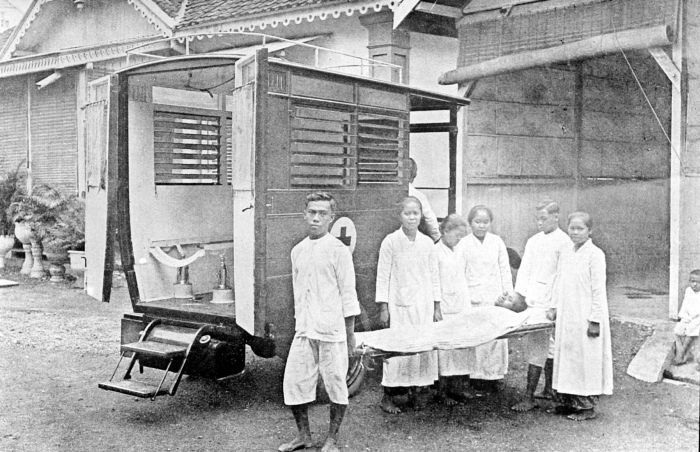 Repronegatief. Verpleegkundigen vervoeren een patiënt met een brancard per ziekenauto